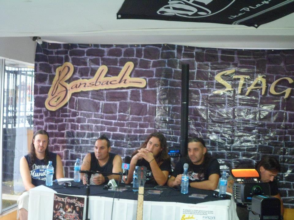 AZRAEL visita en su mes de gira por Centroamérica pasando por Nicaragua, Honduras, El Salvador y México con más de 12 fechas en ciudades como México DF, Sonora, Hermosillo, Sanluis de potosi, Monterrey....